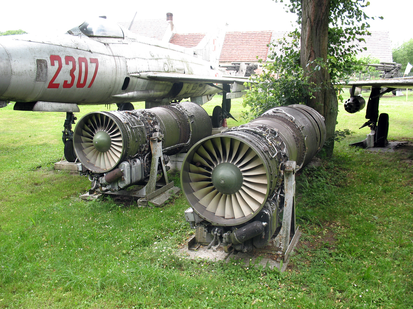 Polish Mig 21 fighter and Tumansky jet engines in open storage.